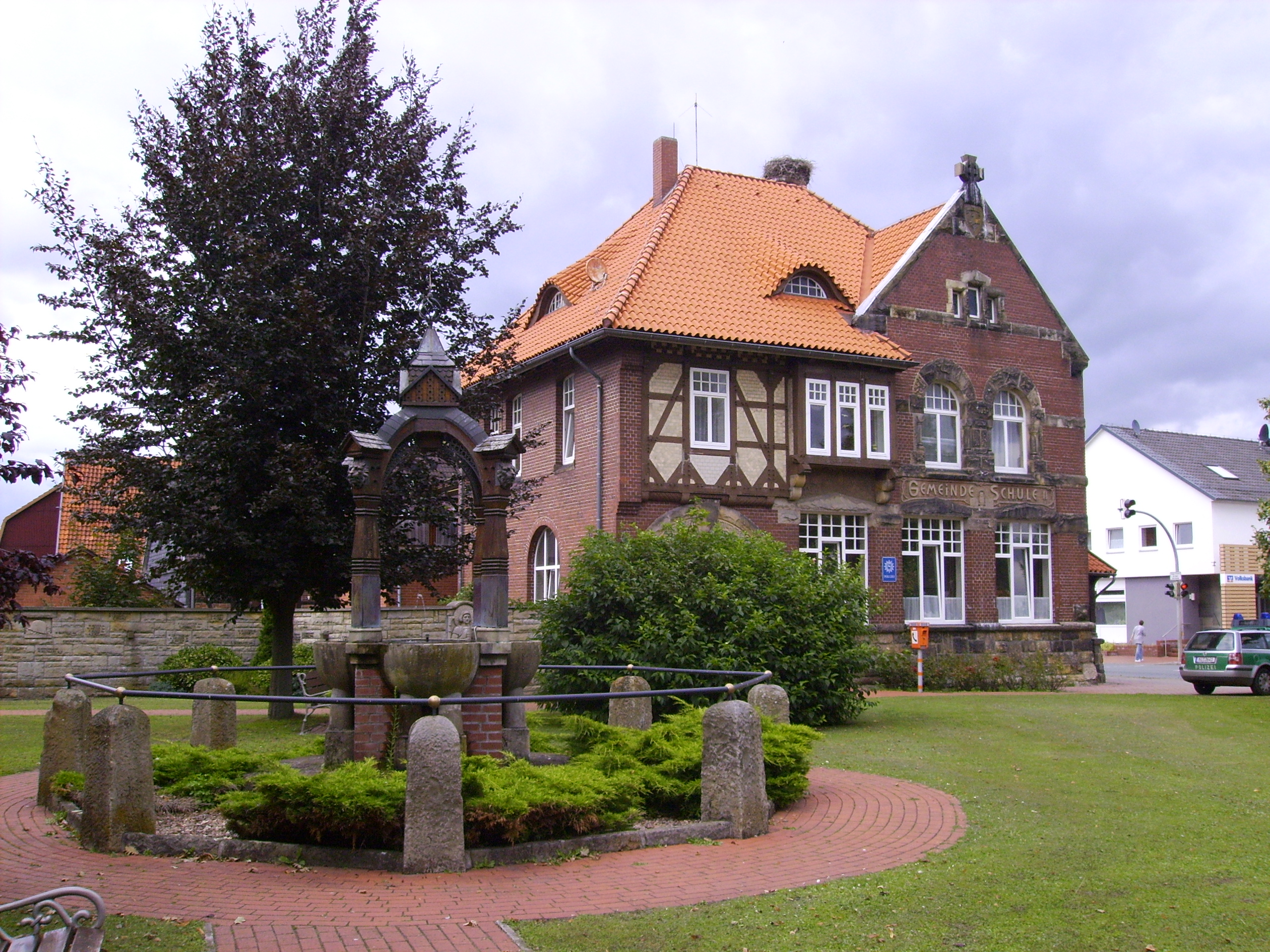 Rehburg: Brunnen und Polizei